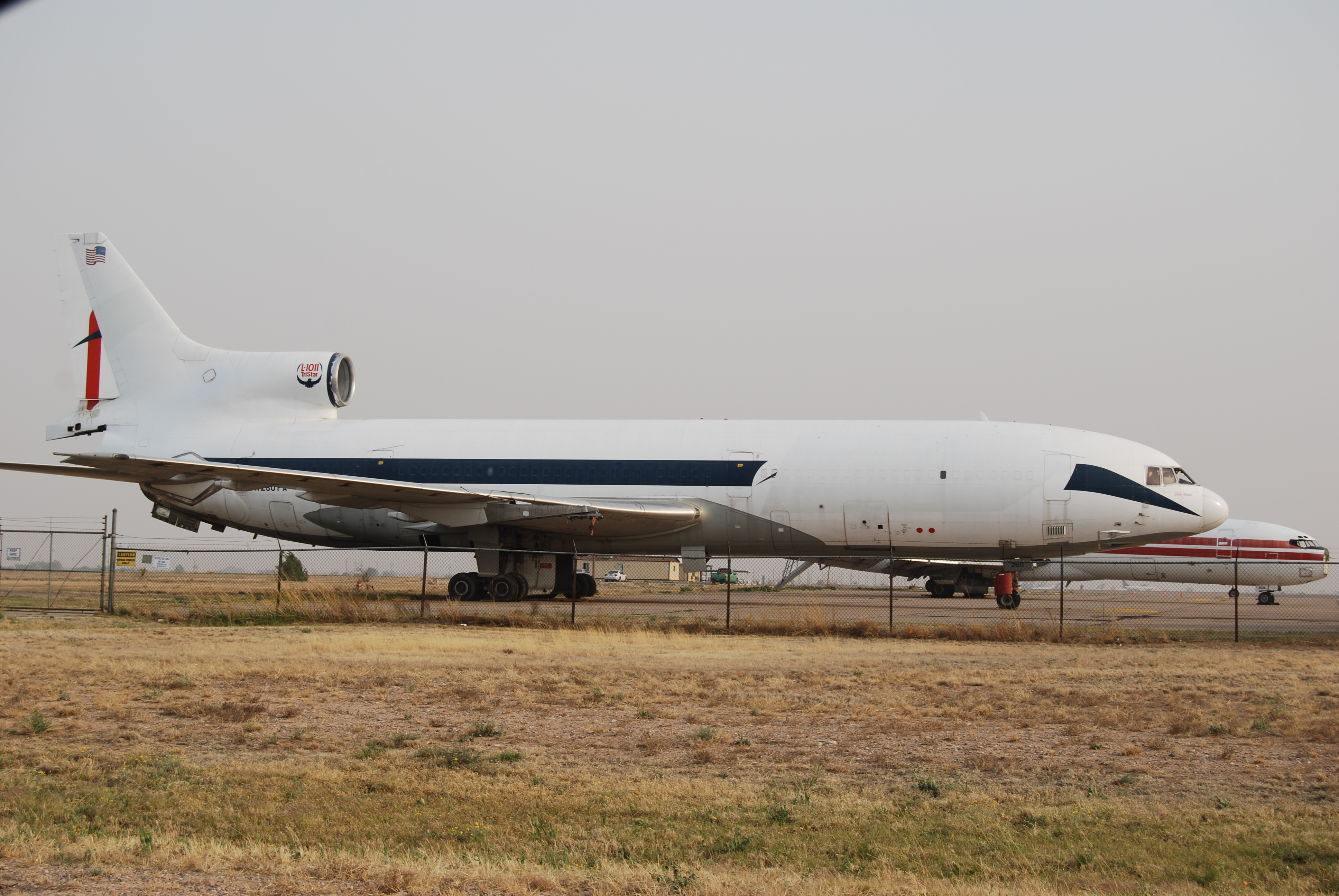 FINE AIR L1011